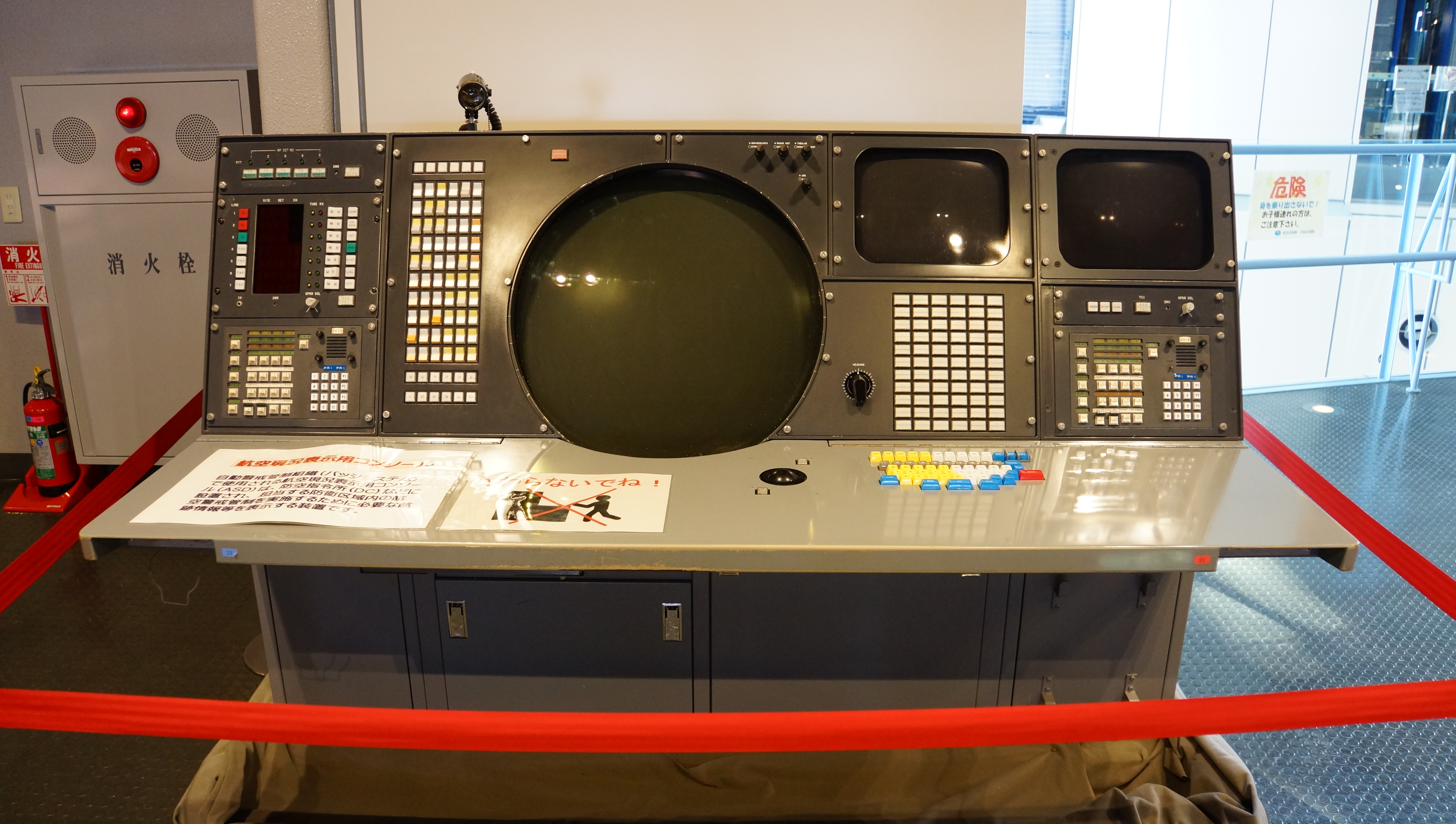 航空自衛隊 バッジ・システム 航空現状表示用コンソール（ASD）。2014年11月24日 浜松広報館（エアーパーク）館内にて。